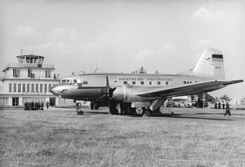 Leipzig, Flughafen, Flugzeug Zentralbild Neumann We.-Bö. 30.8.56 Eröffnung der Flugstrecke Berlin-Leipzig zur Herbstmesse 1956 Mit einem Probeflug, an dem Vertreter der Deutschen Lufthansa teilnahmen, wurde am 29.8.56 der Sonderflugverkehr zur Leipziger Herbstmesse eröffnet. UBz: Das Flugzeug der Deutschen Lufthansa kurz nach der Landung auf dem Flugplatz Leipzig-Mockau.